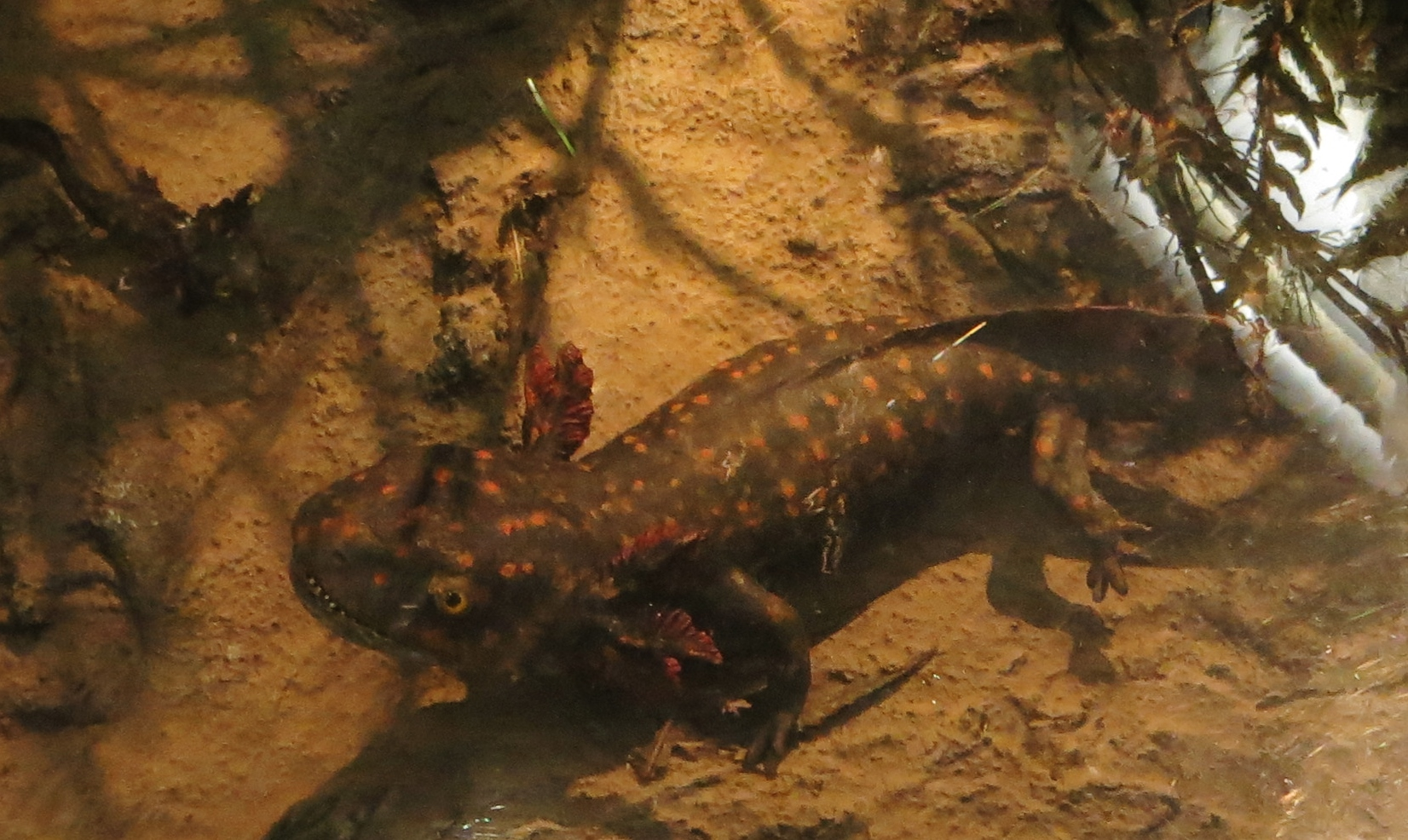 Model of Branchiosaurus- Took the picture at Museum am Lowentor, Stuttgard